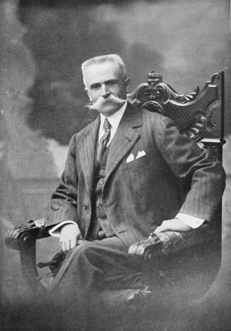 Gedeon Foulquier, French entomologist